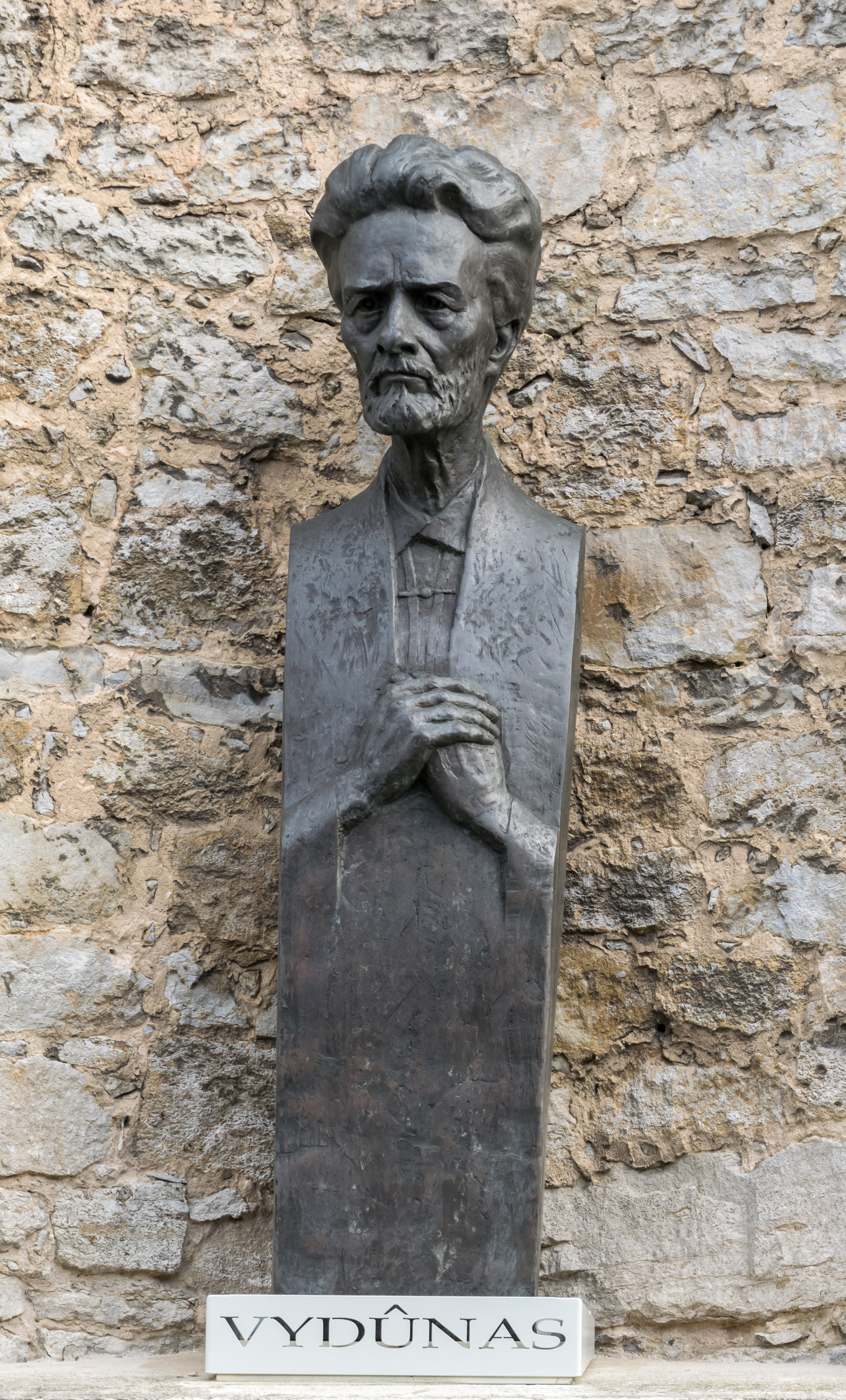 Vydūnas-Büste von 2013 an der Burse in Detmold